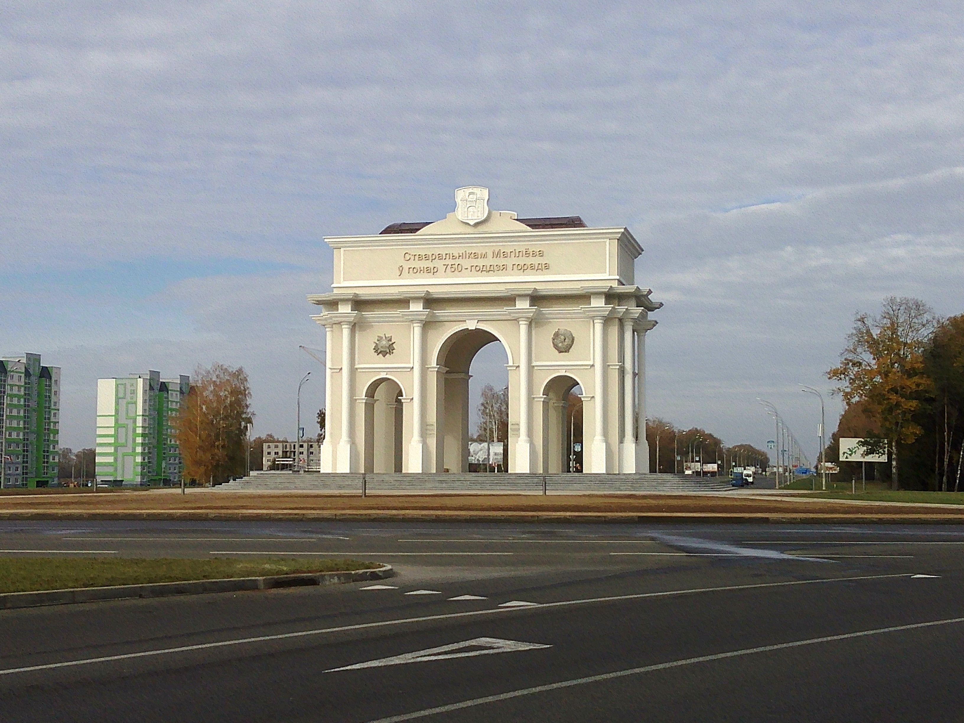 Триумфальная арка в Могилёве